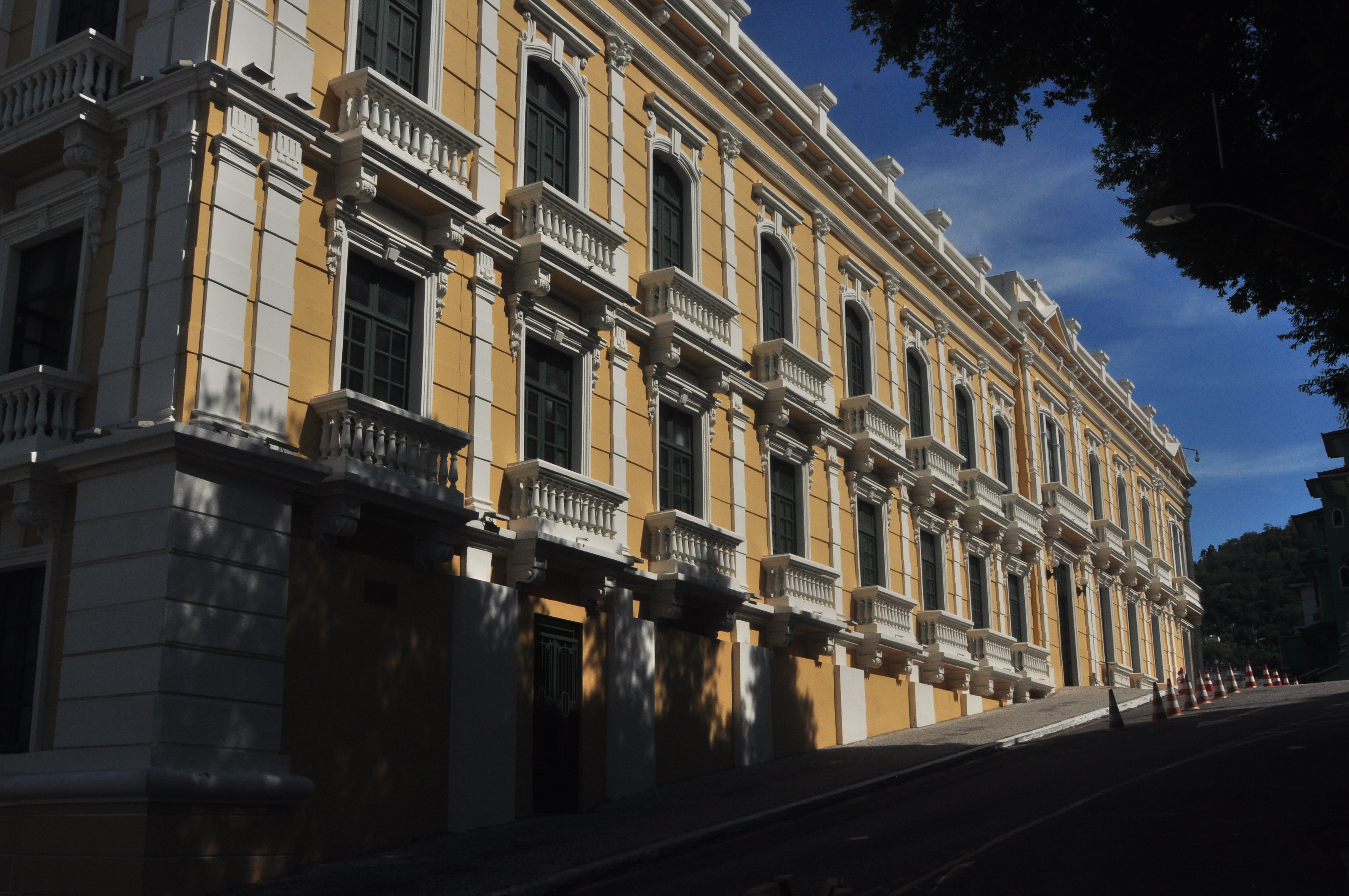 Centro, Vitória - ES, Brazil